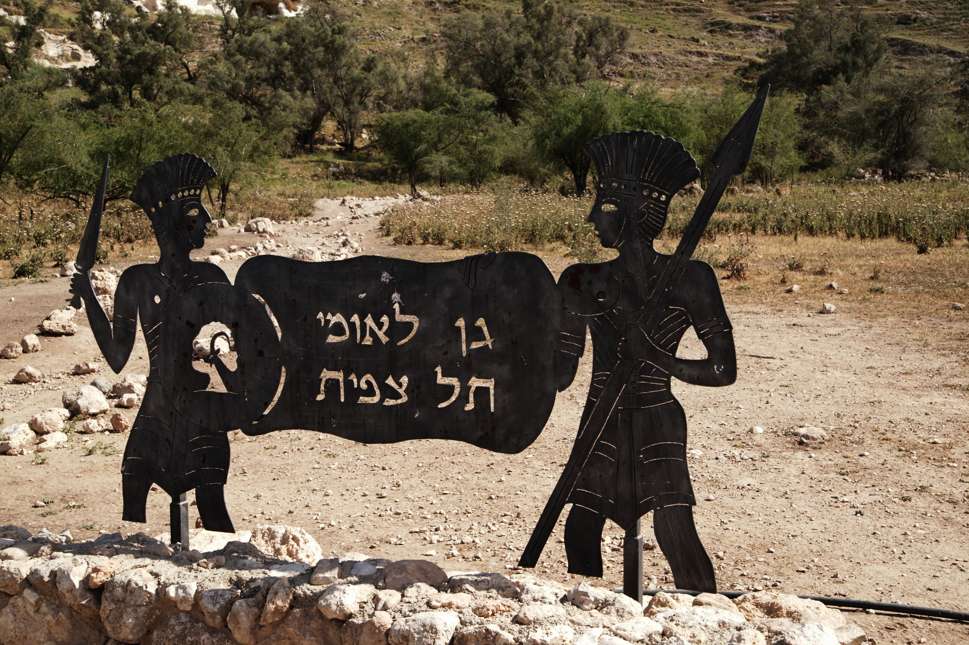 Tel Tsafit: Philisterdarstellung